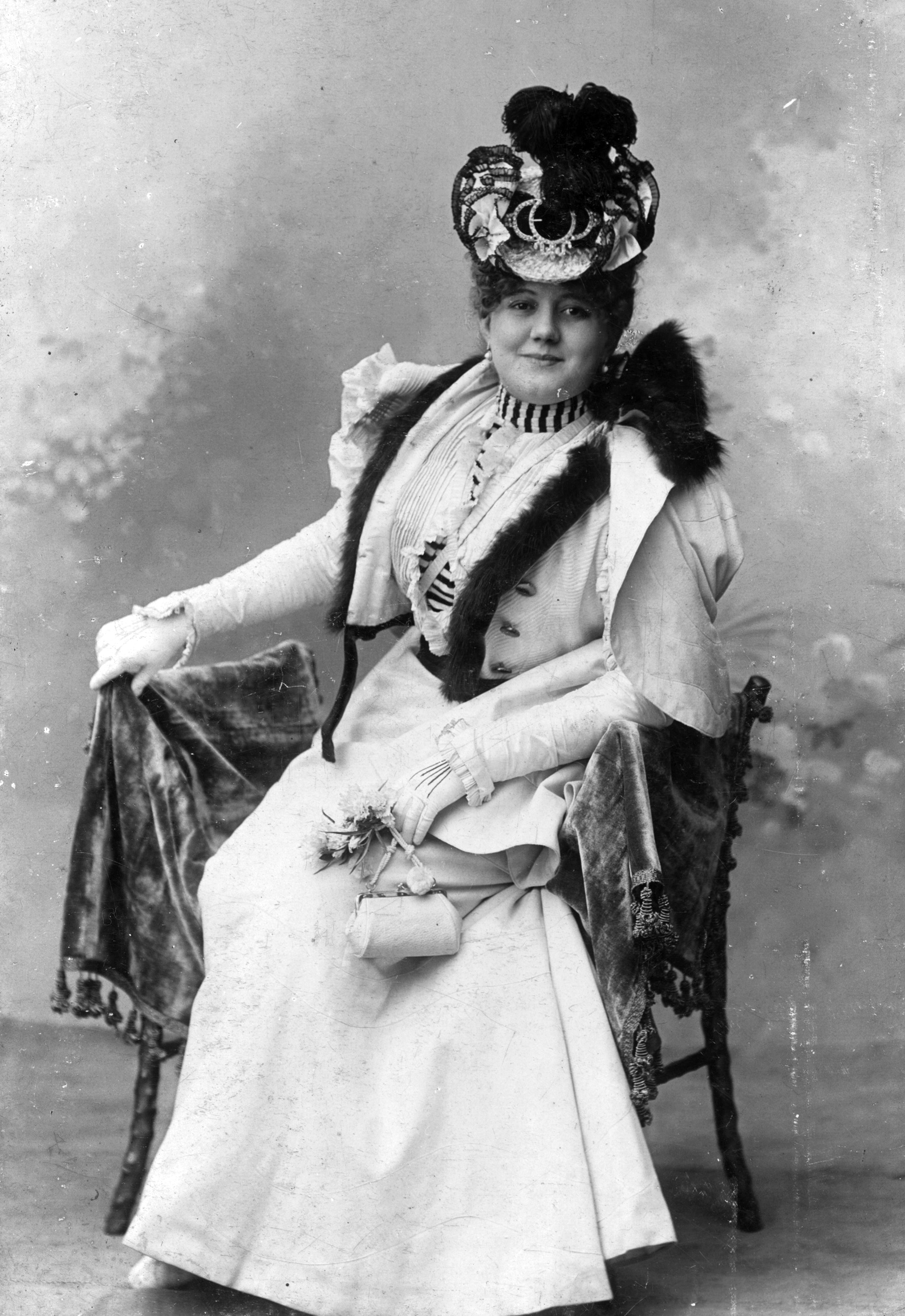 Küry Klára operettprimadonna. Location: Hungary Tags: celebrity, portrait, hat, fashion Title: Küry Klára operettprimadonna.